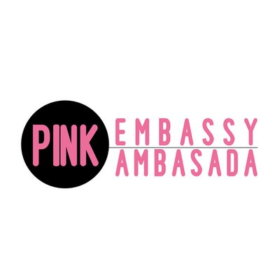 Logo e Ambasadës Pink